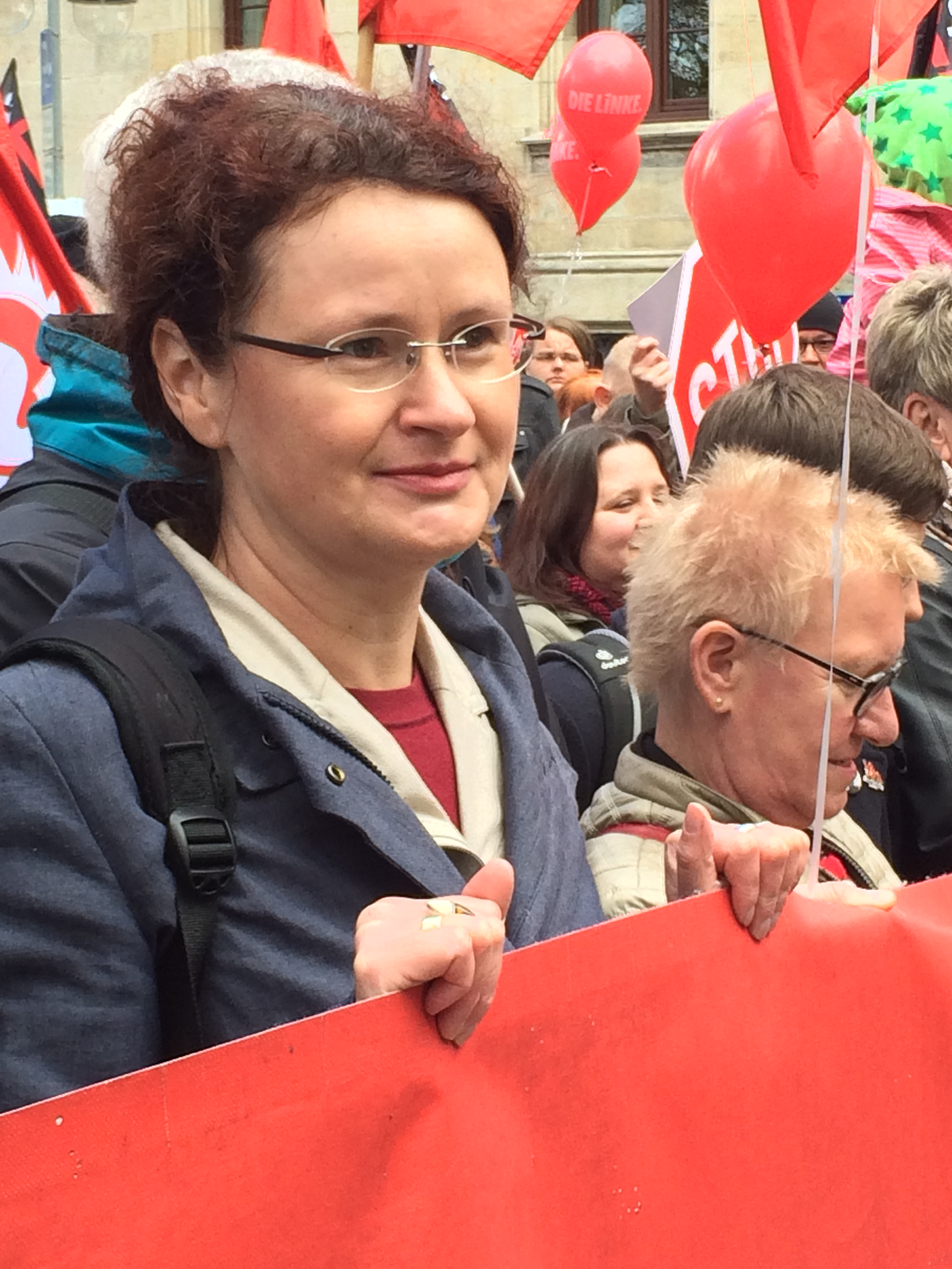 Demo am 23.04.2016 in Hannover: Sigrid Hupach